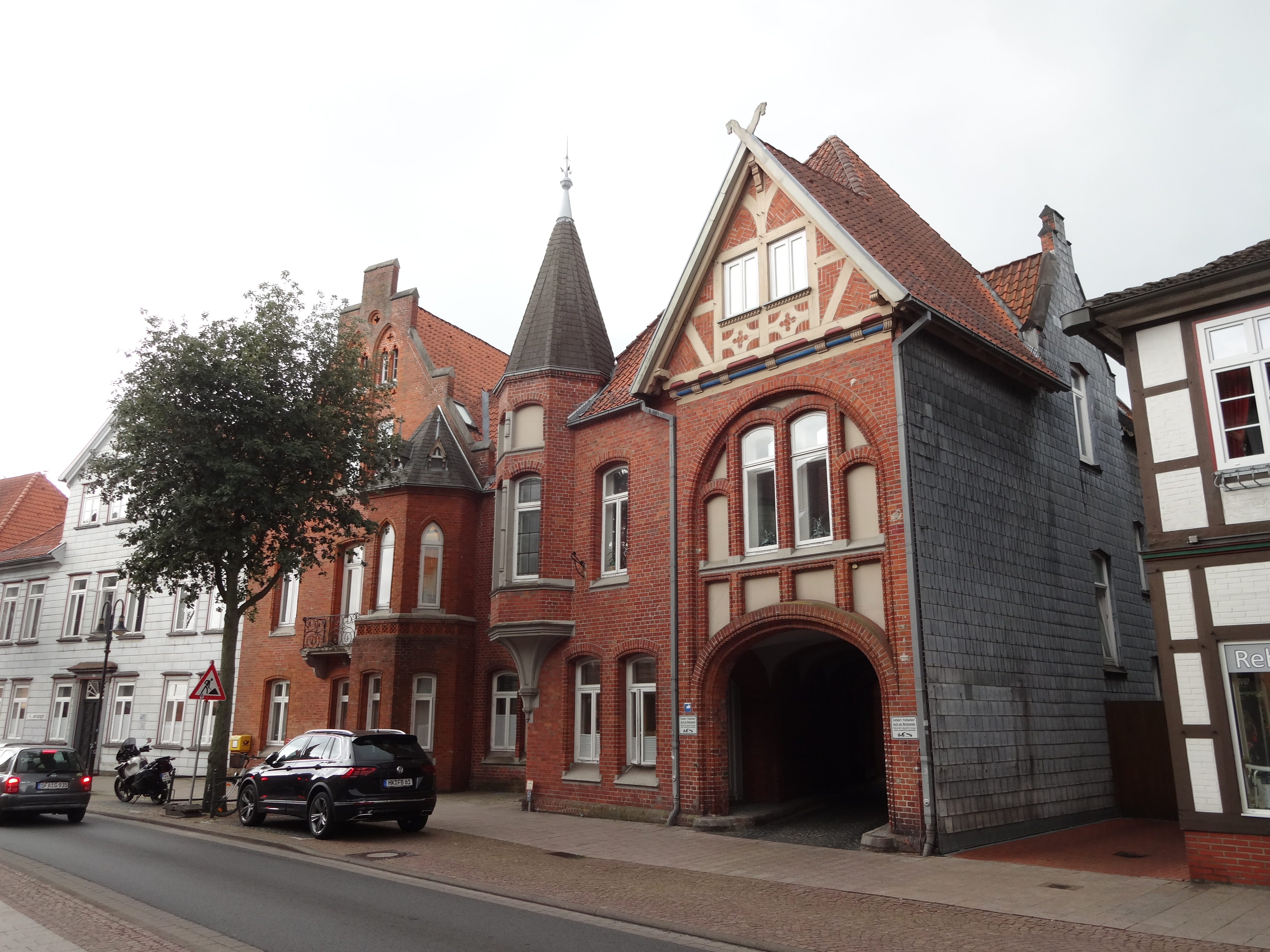 denkmalgeschütztes Amtsgericht Walsrode in der Langen Straße 29-31